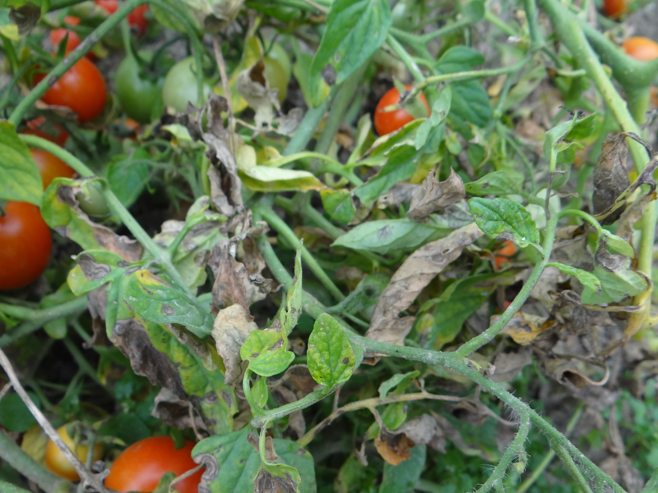 Passalora fulva on Solanum lycopersicum